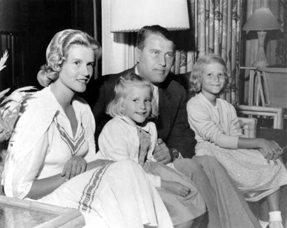 Wernher von Braun mit Familie in den 50er Jahren